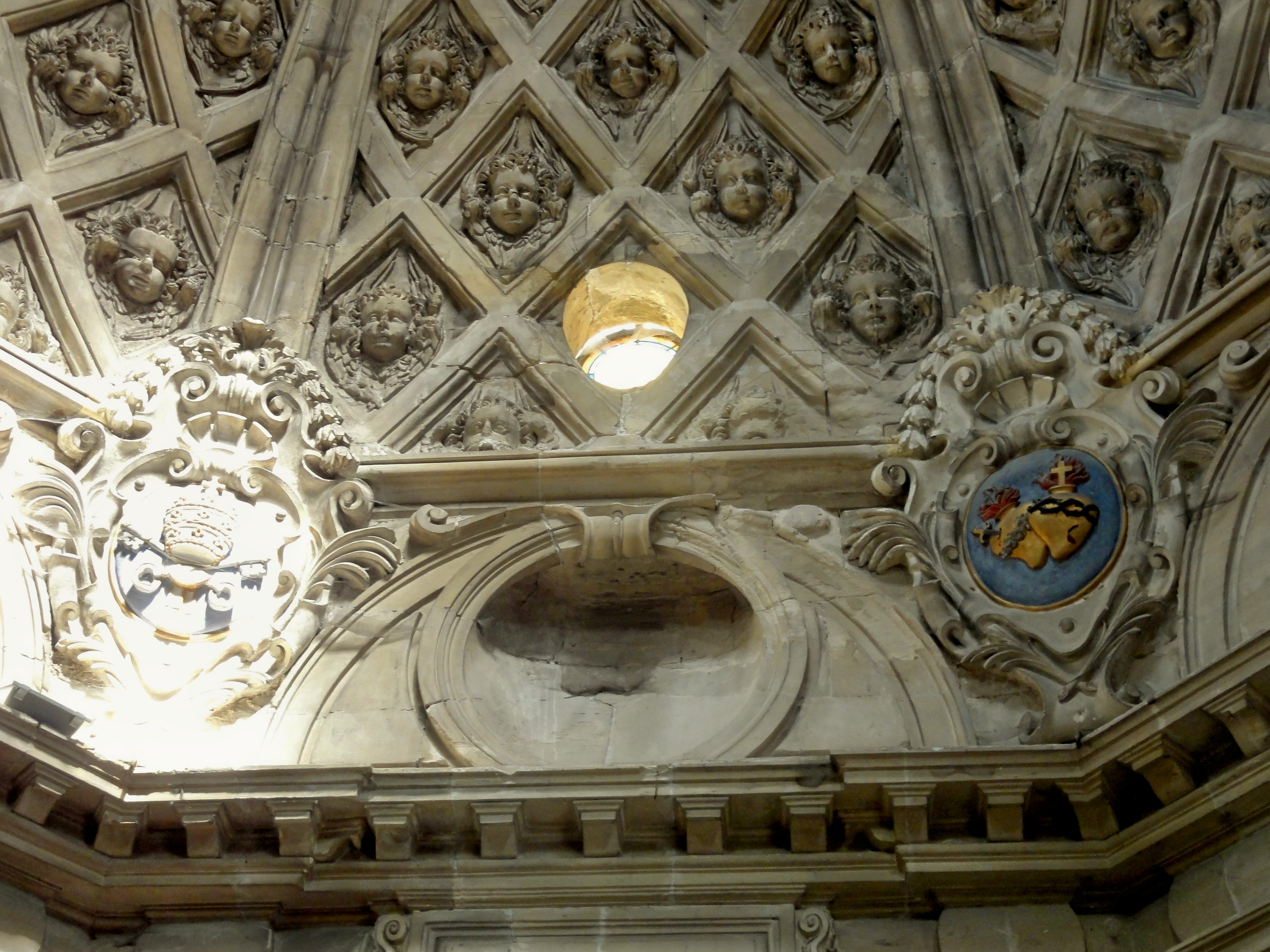 Chapelle du Sacré-Cœur, plafond à caissons.